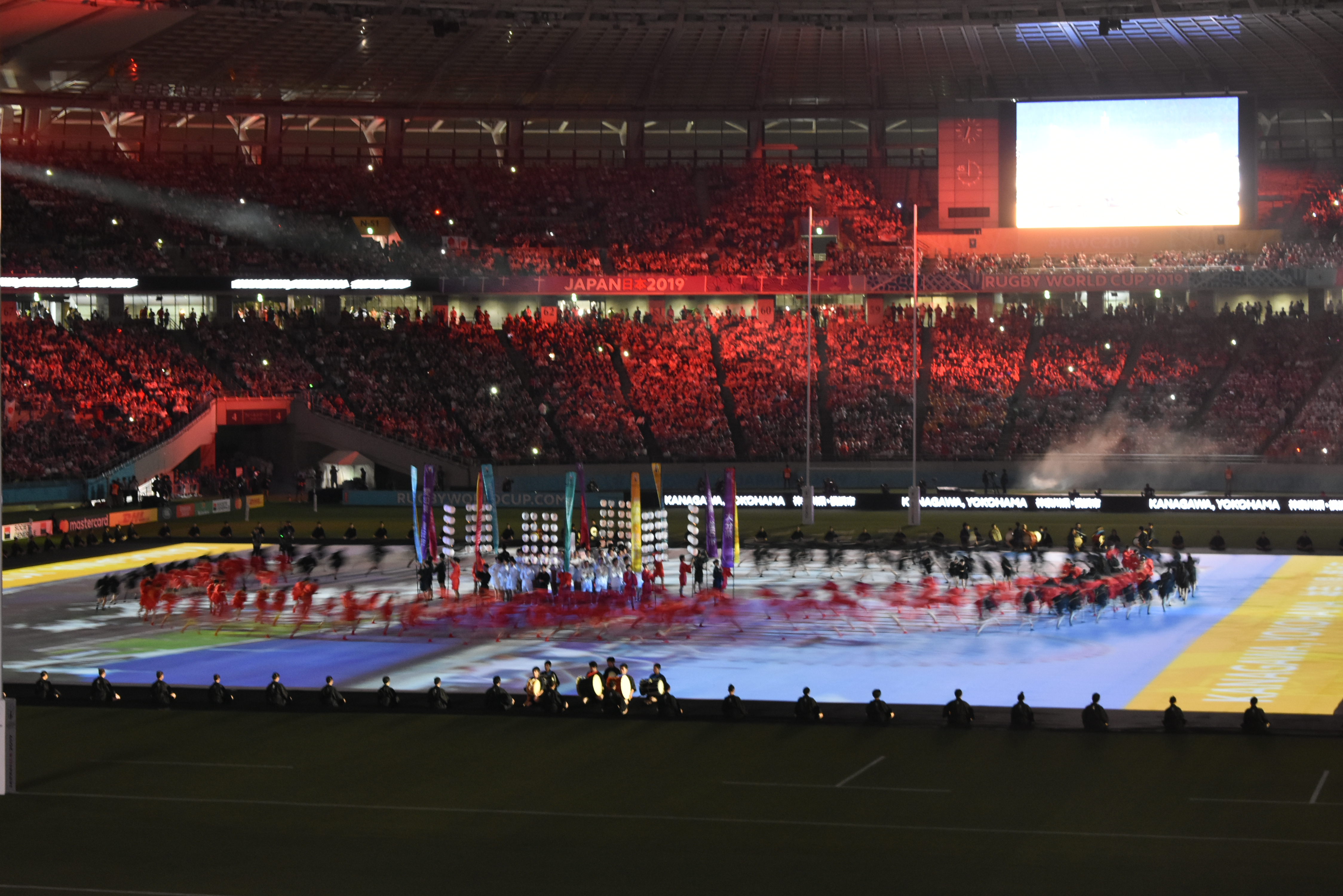 ラグビーワールドカップ